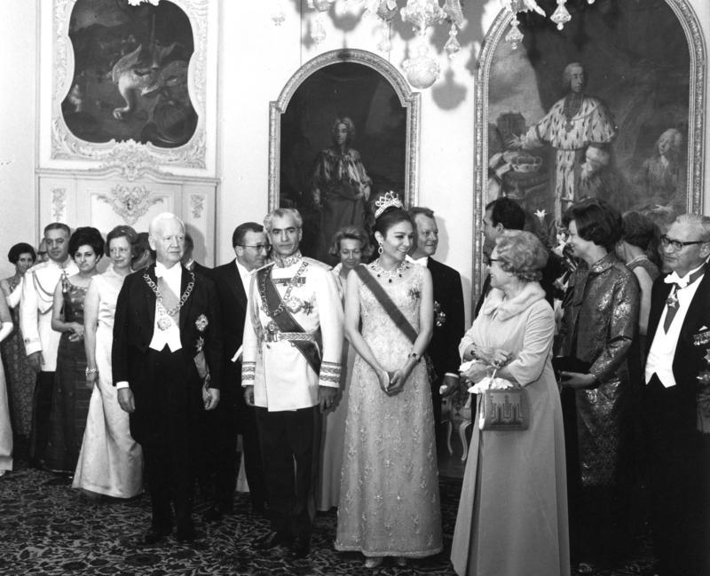 27.5.1967 Staatsbesuch des iranischen Kaisers Mohammed Reza Schah Pahlevi. Bundespräsident Heinrich Lübke gibt einen Empfang auf Schloß Augustusburg in Brühl. Vom 27.5.-4.6.1967 weilte das Kaiserpaar in der Bundesrepublik und besuchte die Städte: Bonn, Köln, Aachen, Jülich, Rothenburg o. T., München, Kiel, Hamburg und Berlin